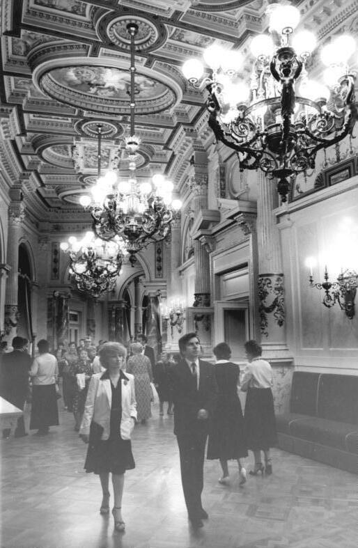 Dresden, Semperoper, Foyer ADN-ZB Hiekel 11.2.86 Dresden: Semperoper. Ein Besuch in der Semperoper ist ein Erlebnis, nicht nur wegen der Aufführungen, sondern auch wegen der einmaligen Innenarchitektur des Bauwerkes. Die Rundfoyers - hier auf der Theaterplatzseite - wurden von Bauarbeitern und Handwerkern originalgetreu nachgestaltet. Foyers und Vestibüle waren bei dem Bombenangriff am 13. Februar 1945 zwar nicht völlig zerstört, aber stark in Mitleidenschaft gezogen worden. Am 40. Jahrestag der Zerstörung des Opernhauses, am 13.2.85, nahm es den Spielbetrieb wieder auf. - siehe 29 und 30n und ADN-Meldung